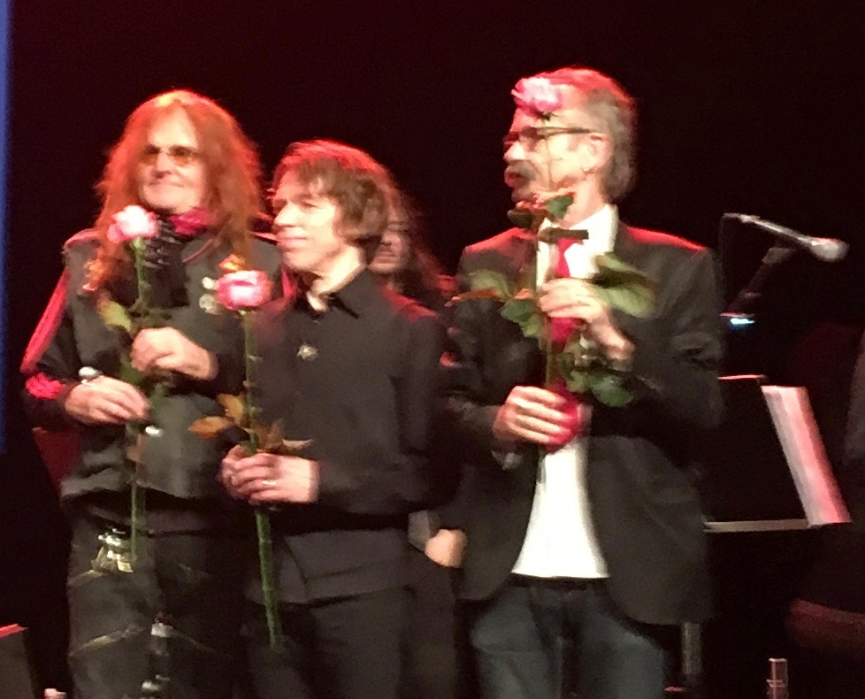 Pelle Miljoona, Sami Hurmerinta, Leo Friman. Kulttuuritalo 26.11.2016 Love Records